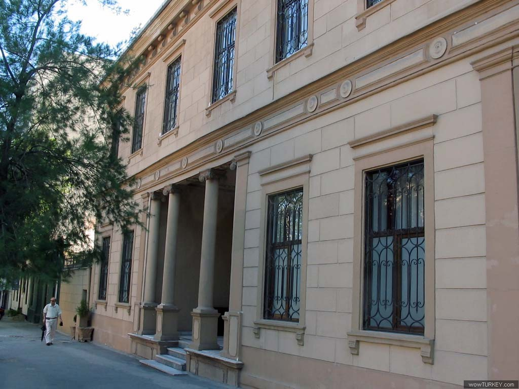 House in Bornova, İzmir, Turkey